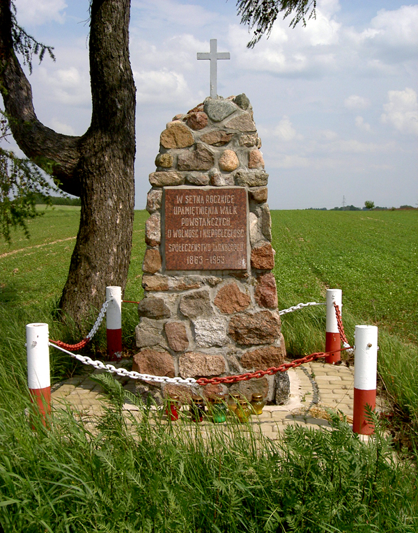 Tarnogród, Poland • Pomnik Siekane - "Siekane" monument